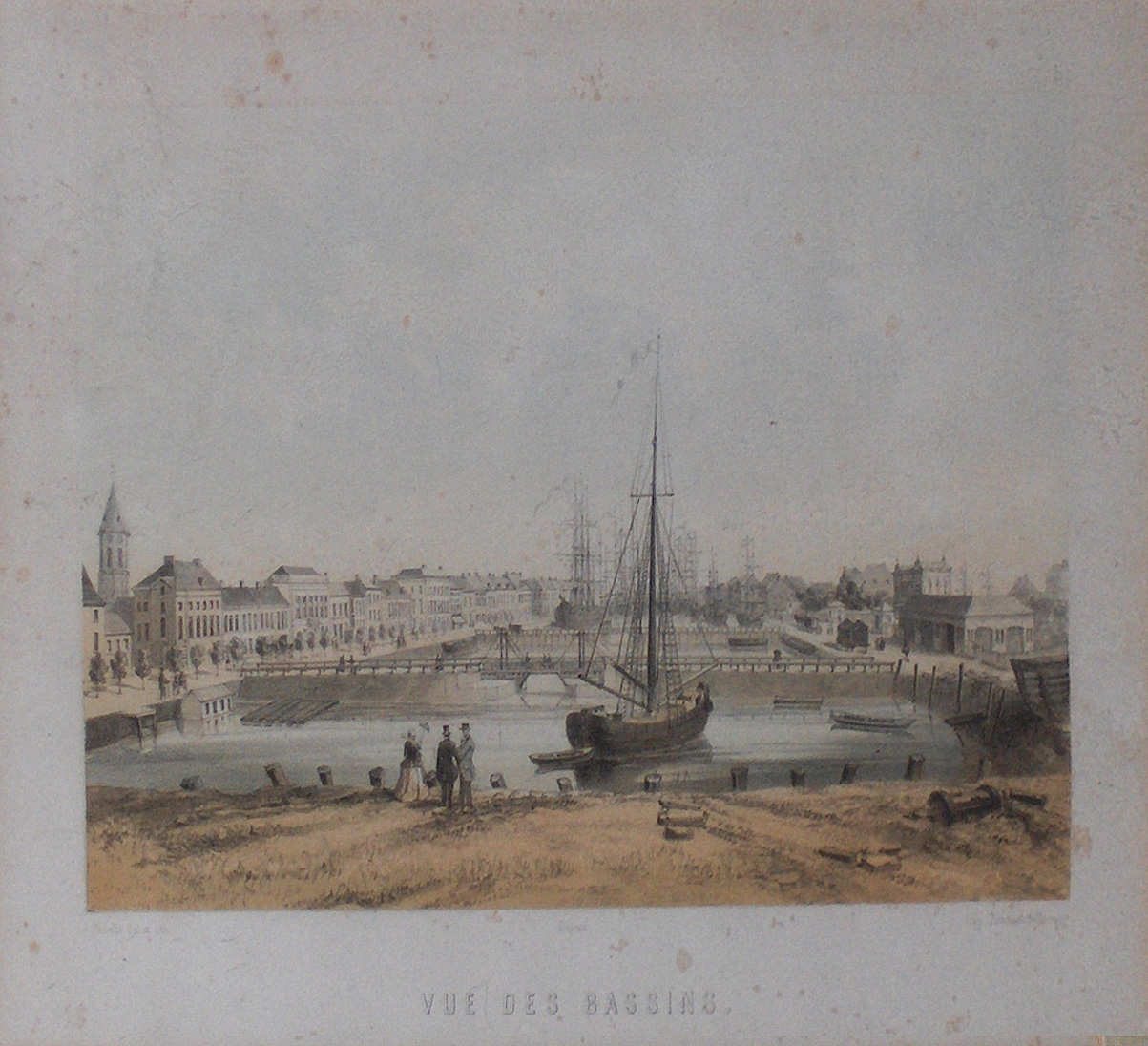 Het (nu gedempte) Handelsdok te (Oostende, België; einde 19de eeuw). Oude litho door een anonieme kunstenaar